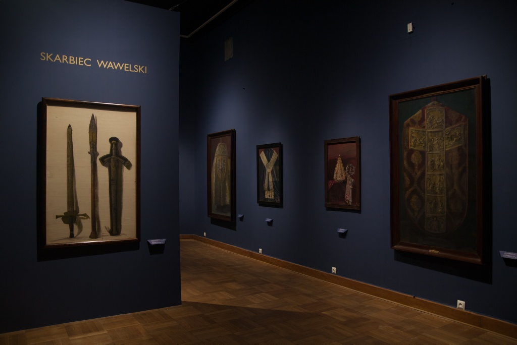 Cykl Skarbiec wawelski Leona Wyczółkowskiego prezentowany na wystawie czasowej Mistrzowie pastelu. Od Marteau do Witkacego w Muzeum Narodowym w Warszawie